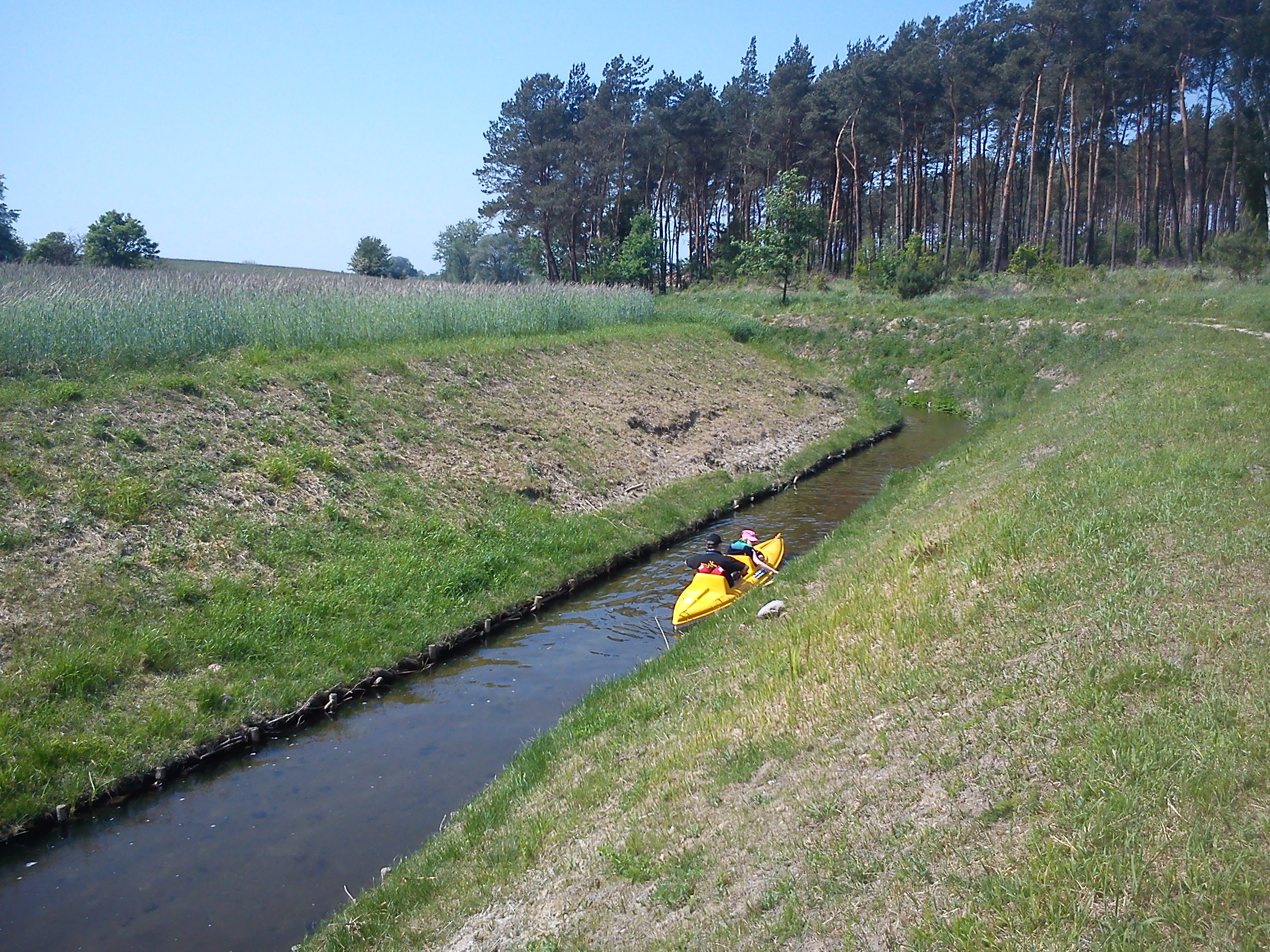 Główna - rzeka nieopodal Pobiedzisk.